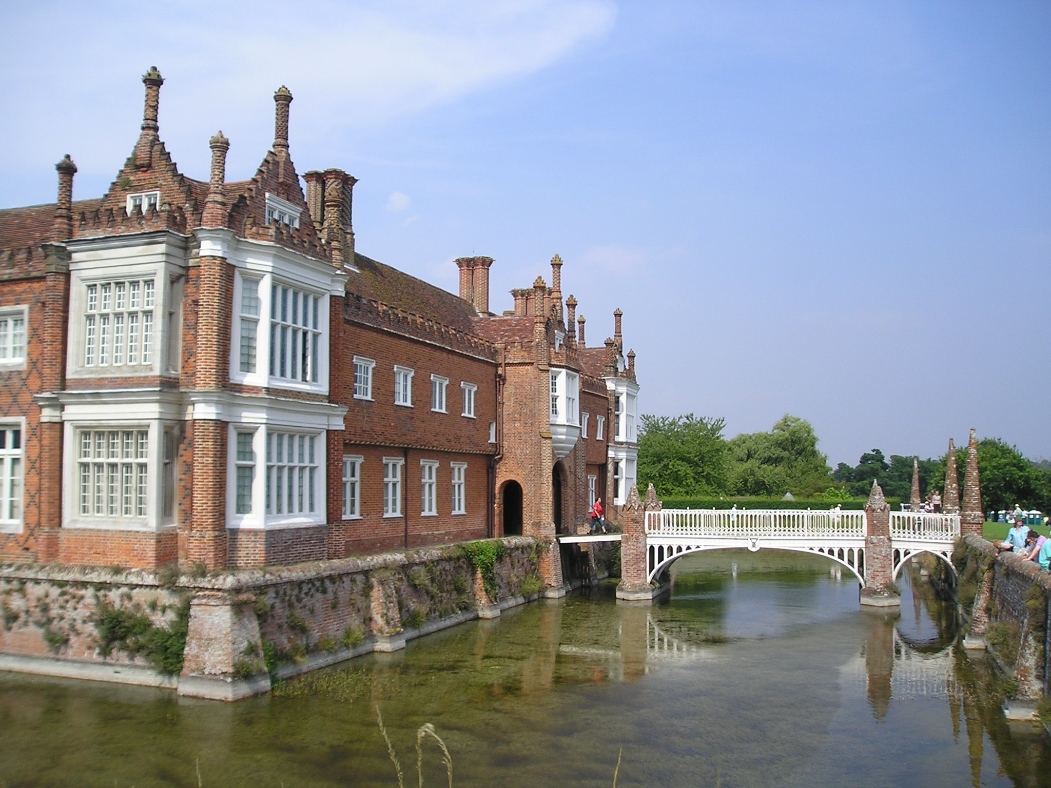 Helmingham Hall